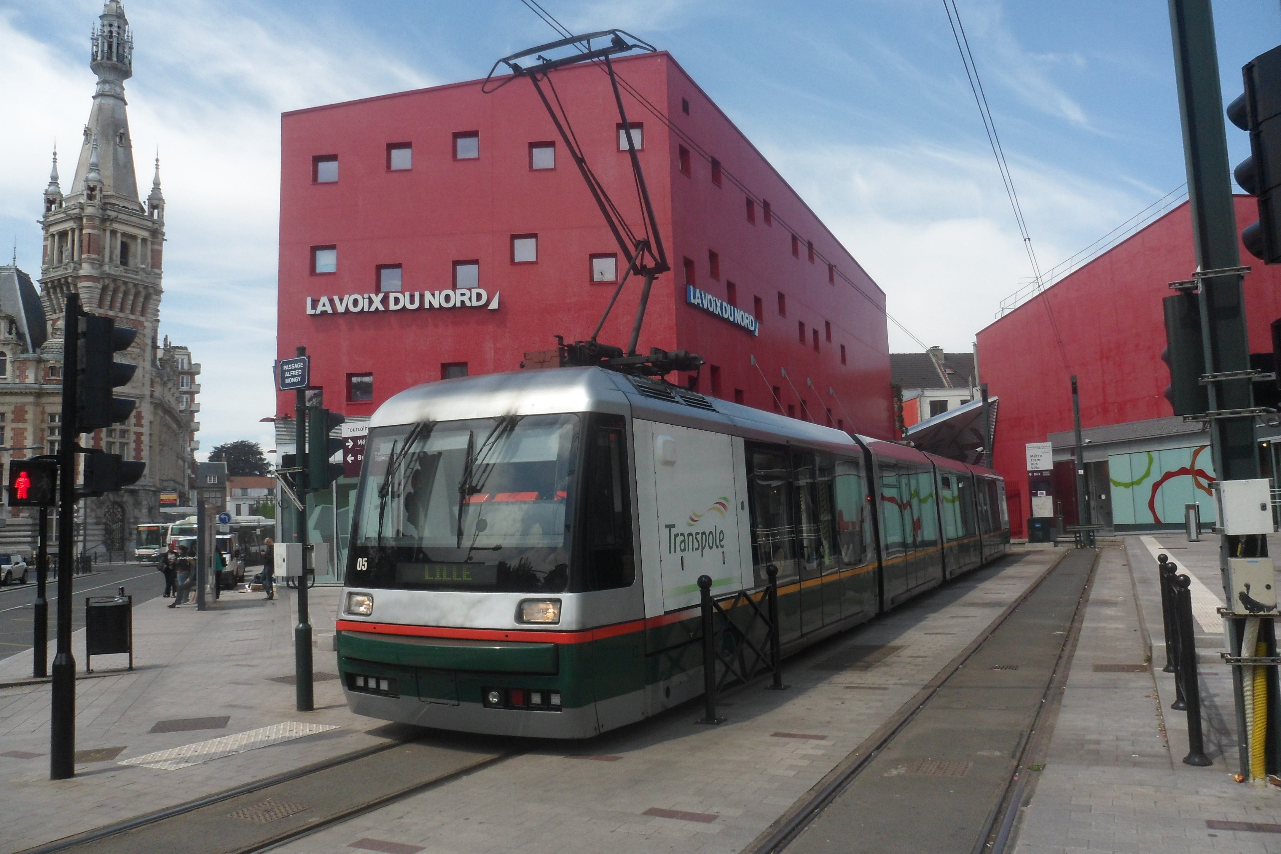 Breda n°05 à Tourcoing Centre, sur la ligne T du tramway de Lille.